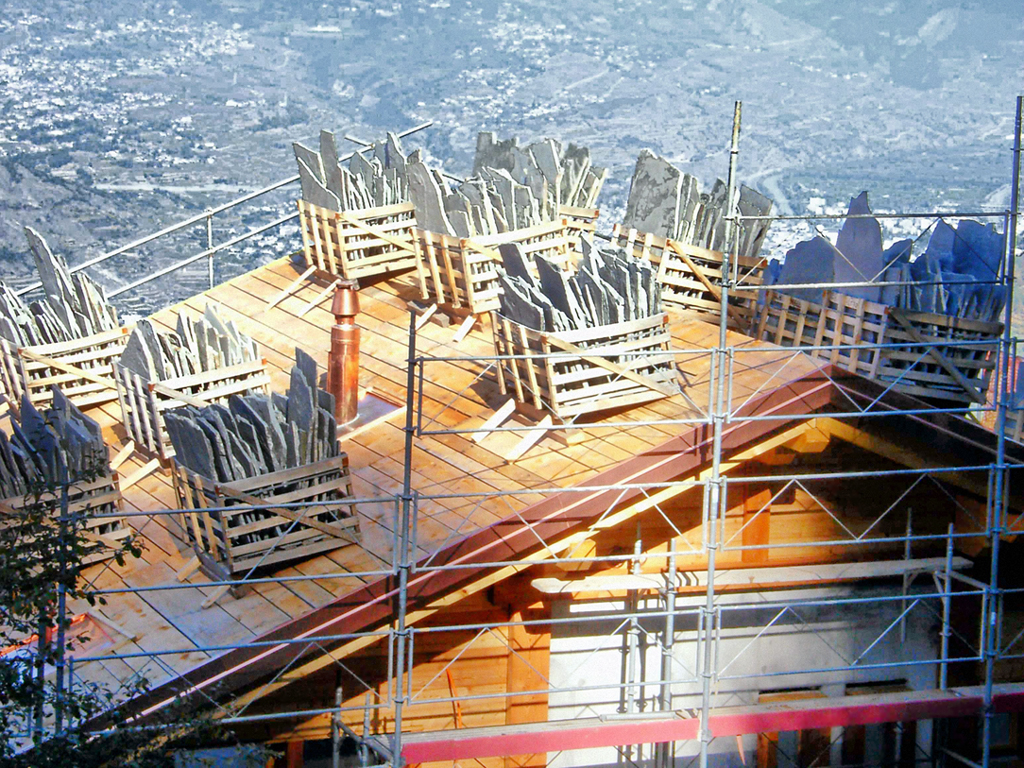 Dachdeckung mit Natursteinplatten im Wallis